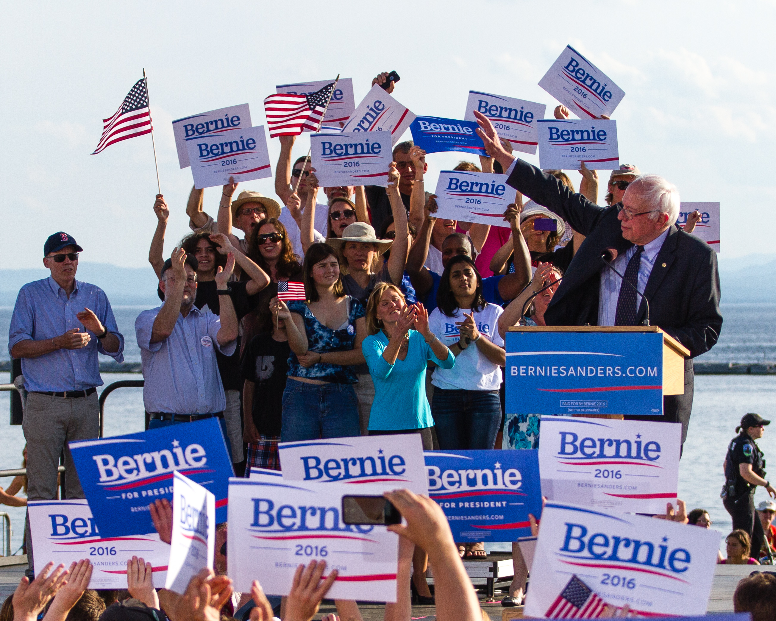 Bernie Sanders